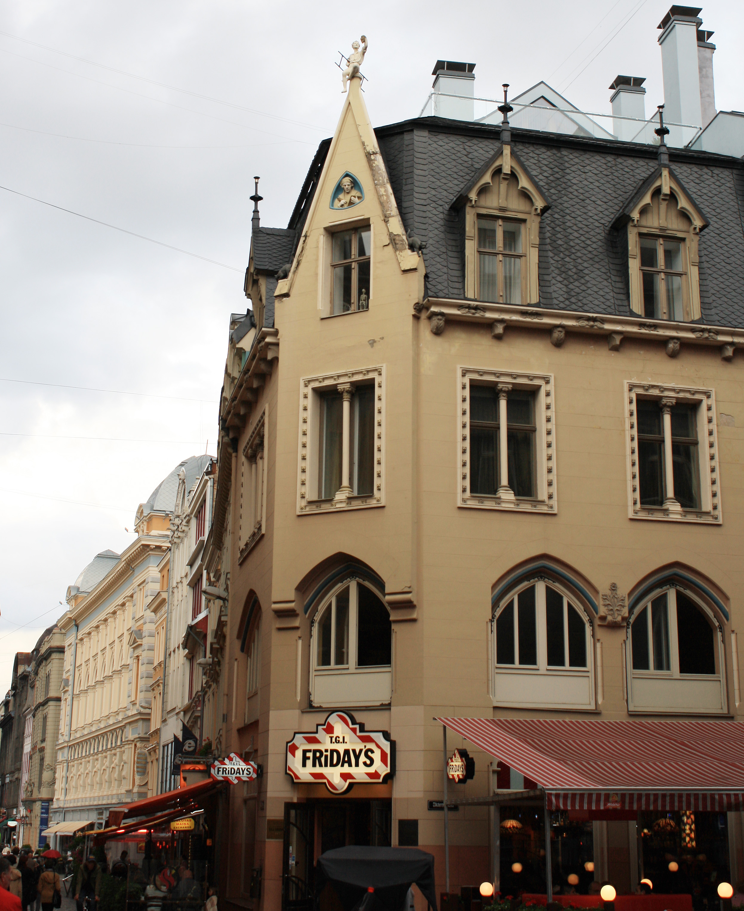 Рига (Латвия) Старый город Дом с трубочистом (Kalku iela)